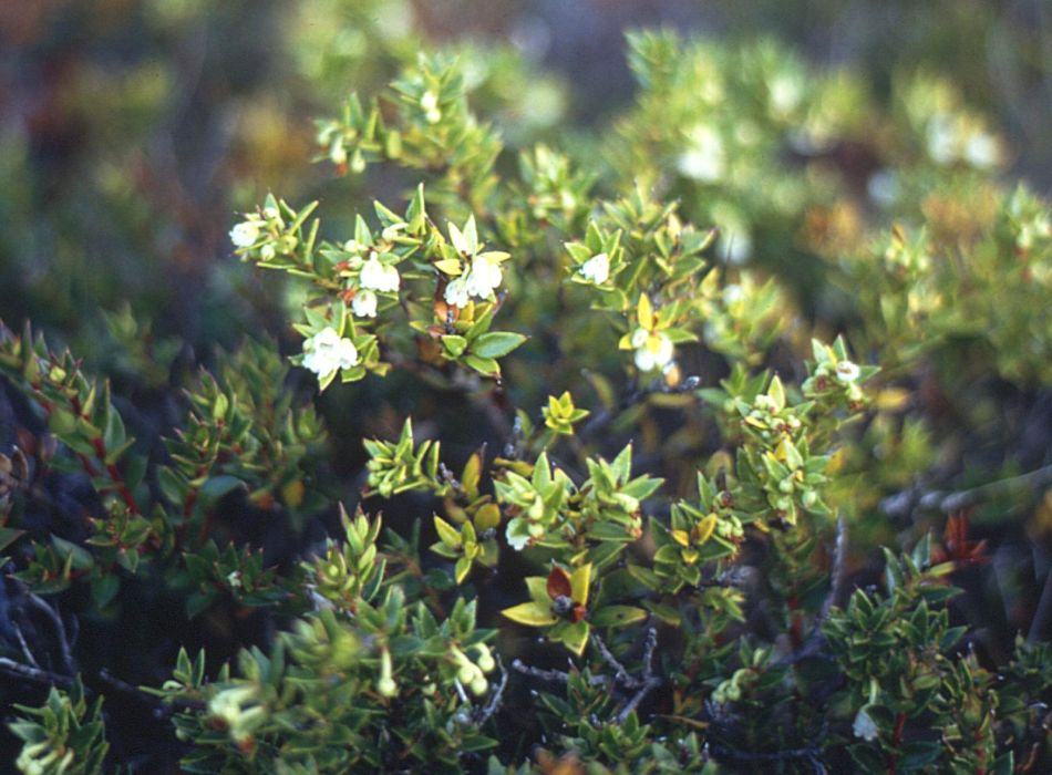 Gaultheria mucronata (=Pernettya mucronata), (Ericaceae) - Chile, Patagonien/Patagonia, Parque Nacional Torres del Paine, N Posada Río Serrano